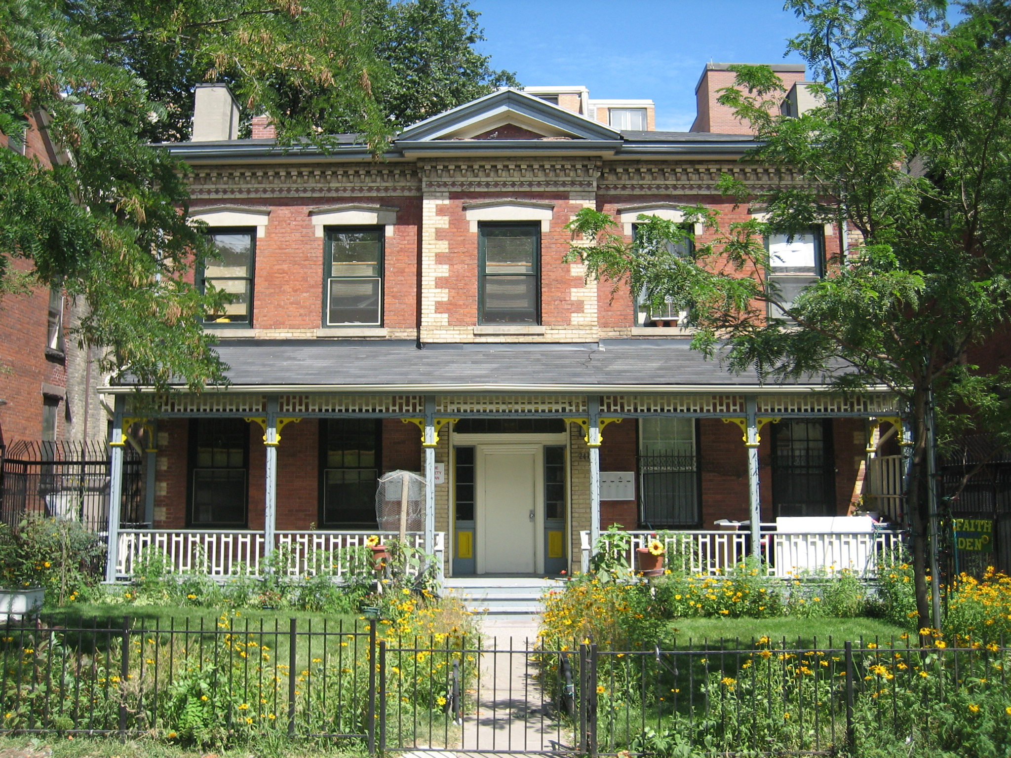 Allandale (Toronto)